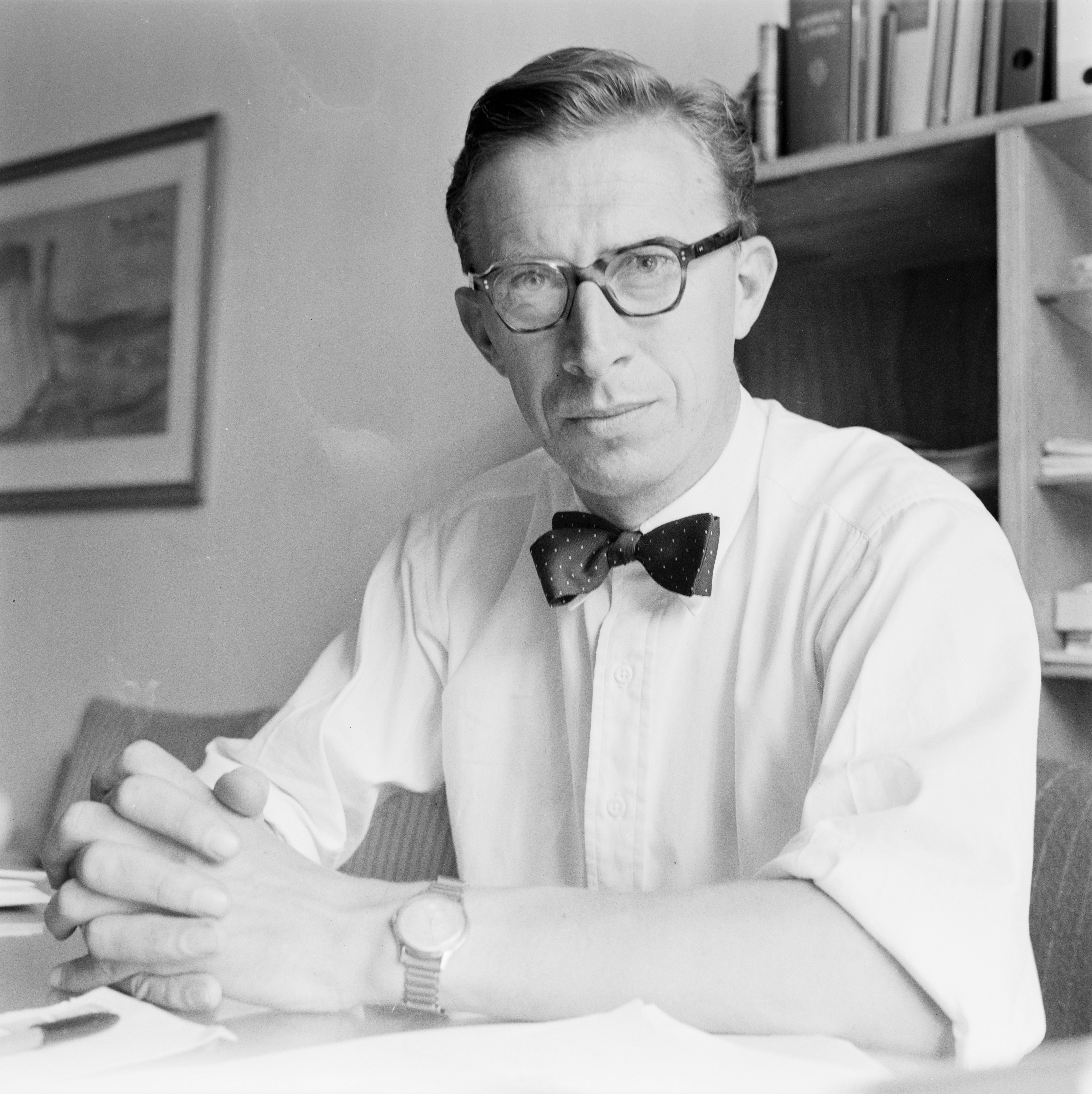 Bildet er hentet fra Arkivverket. Trygve de Lange Arkivinstitusjon : Riksarkivet Arkivnavn : Billedbladet NÅ Sted : Norge, Oslo, Oslo, Ukjent Emneord: Menn, Norske advokater, Høyre-politikere Avbildet